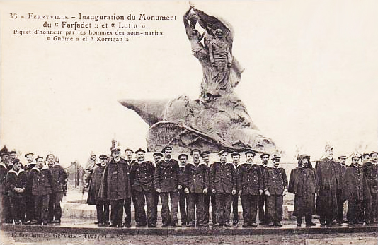 P Gervais - 1909 - Inauguration du monument aux victimes du Farfadet et du Lutin